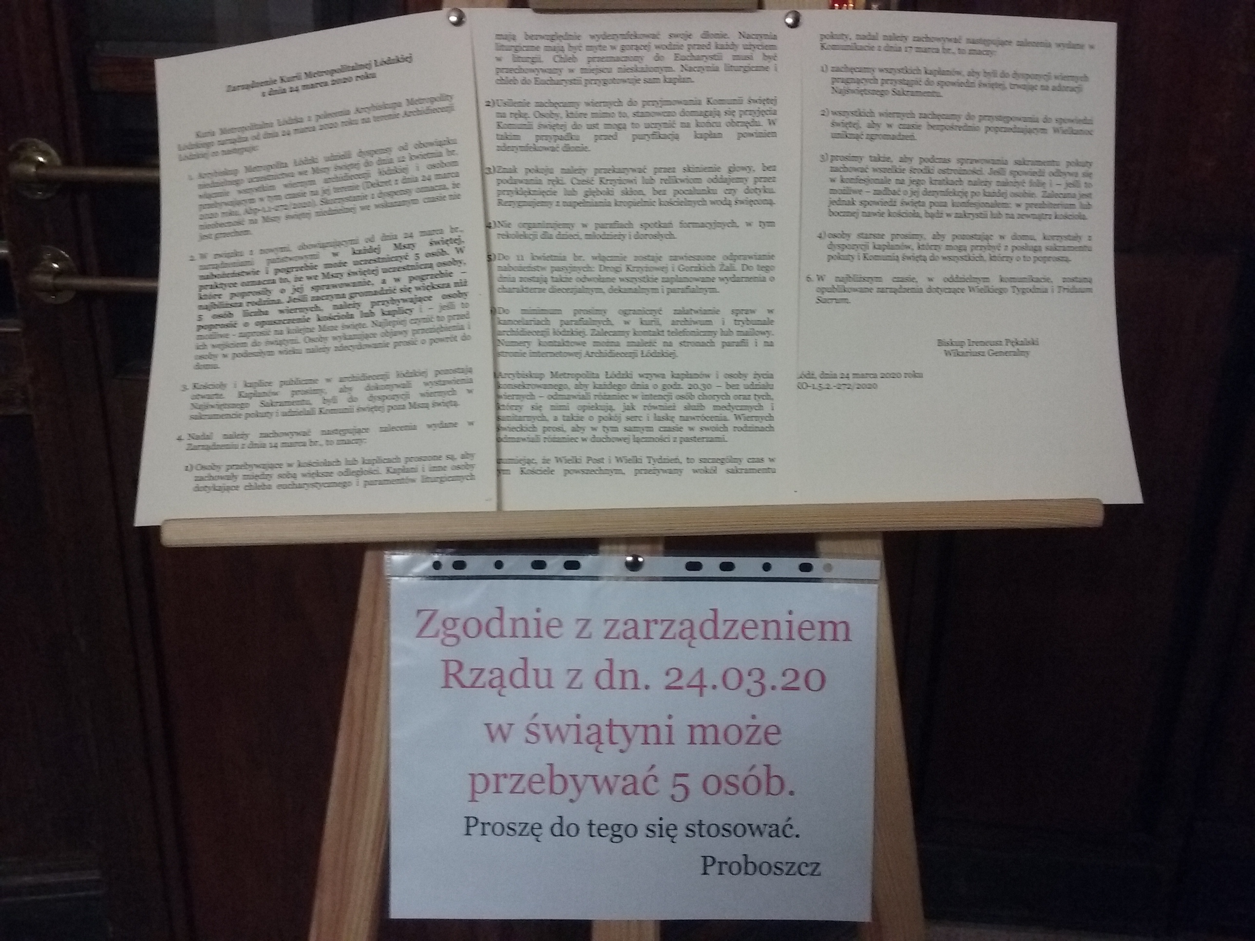 Informacja o limitach obecności w kościołach rzymskokatolickich wraz z zarządzeniem kurii